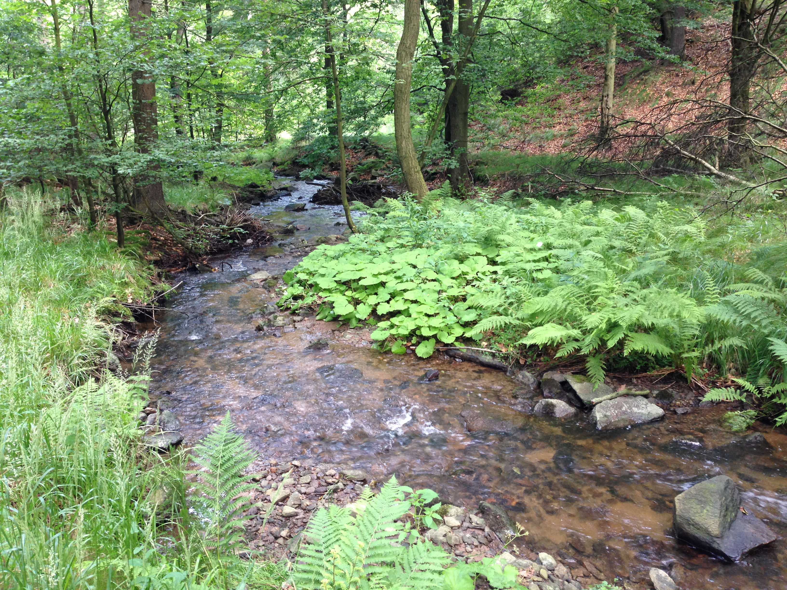 Meandrující potok Slatina v Mordové rokli nedaleko Krásného Lesa a Petrovic v Krušných horách